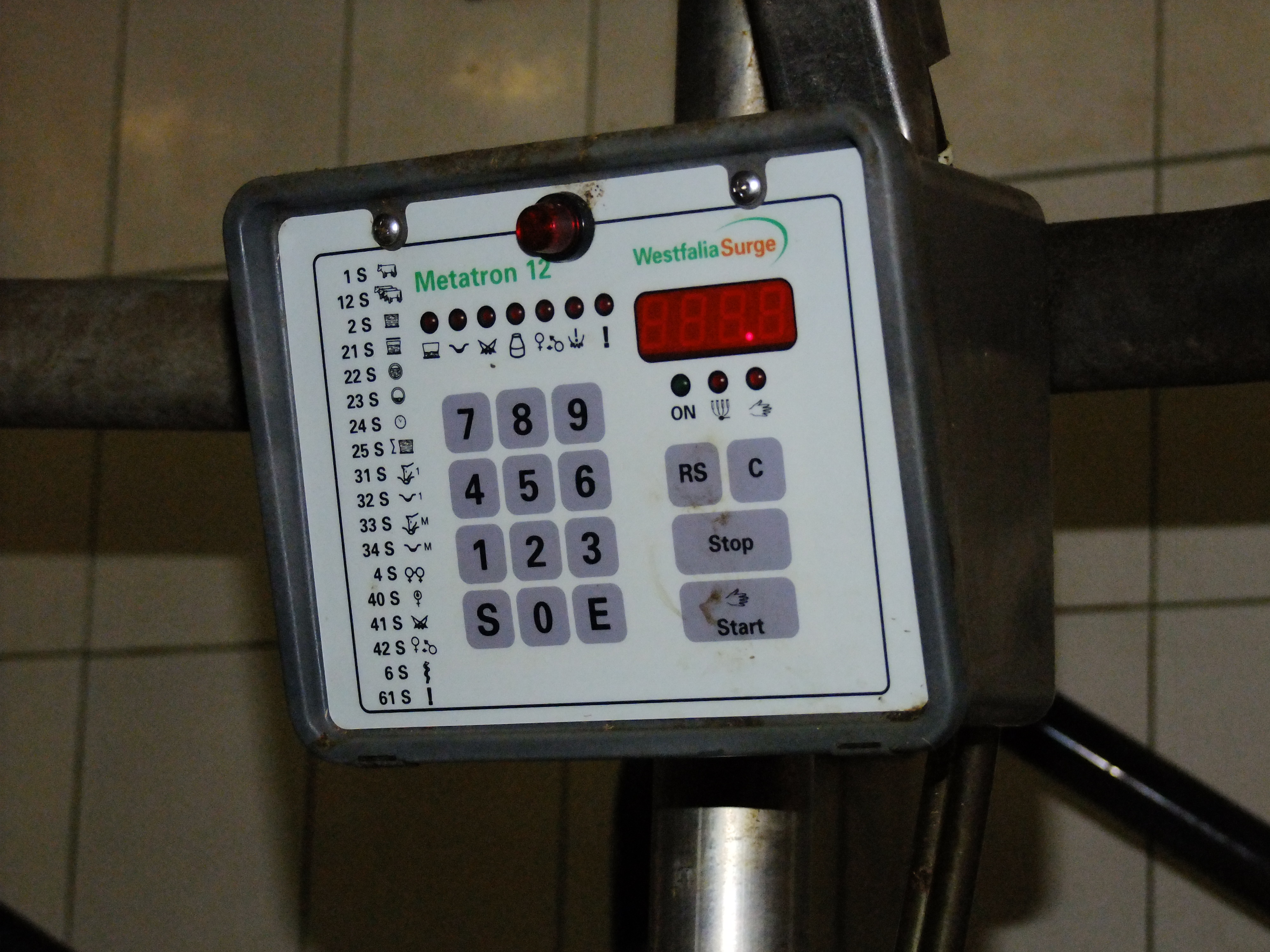 Merilna enota v molzišču.